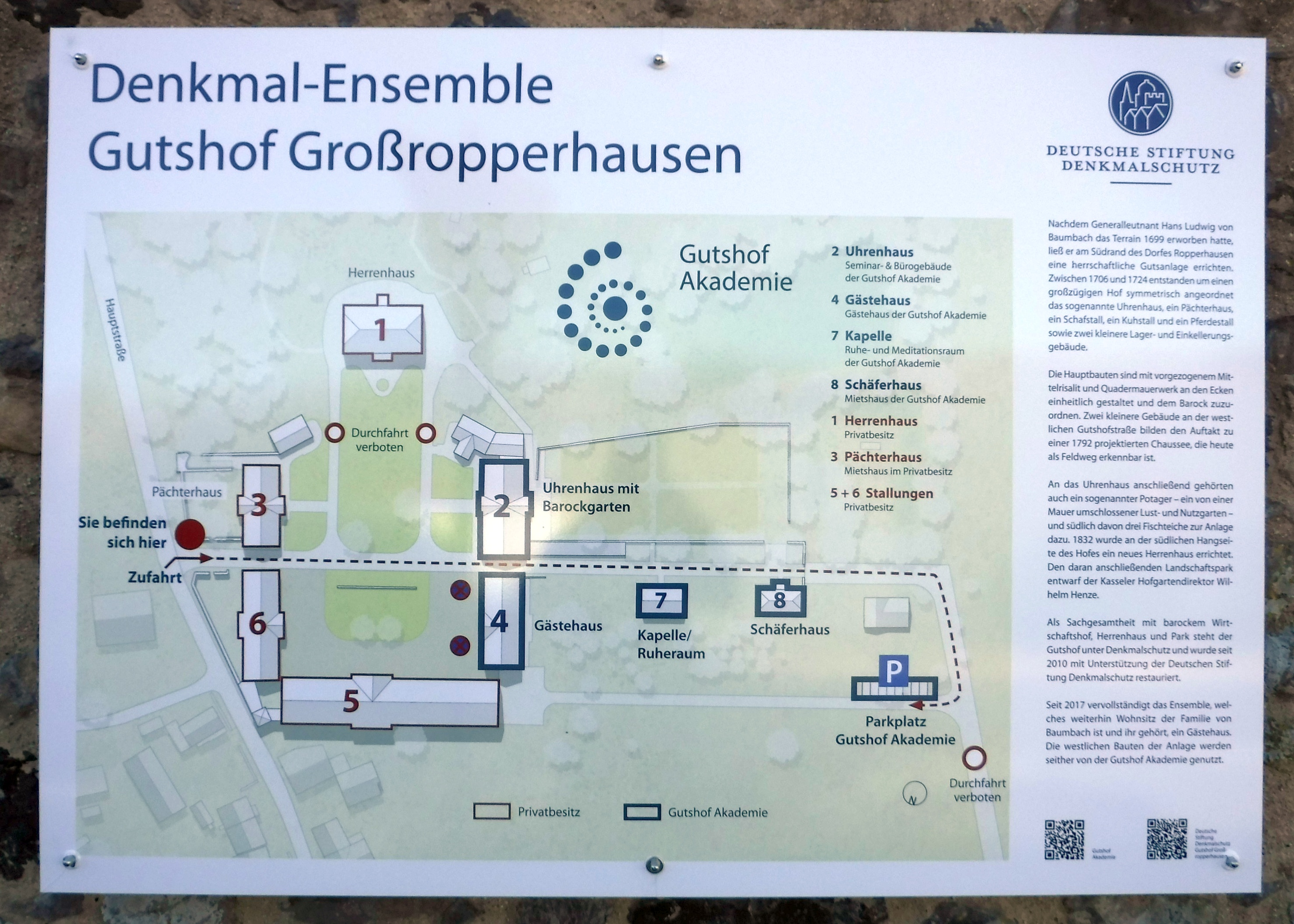 Plan von Schloss und Gut Großropperhausen, dem größten Barockgut Hessens